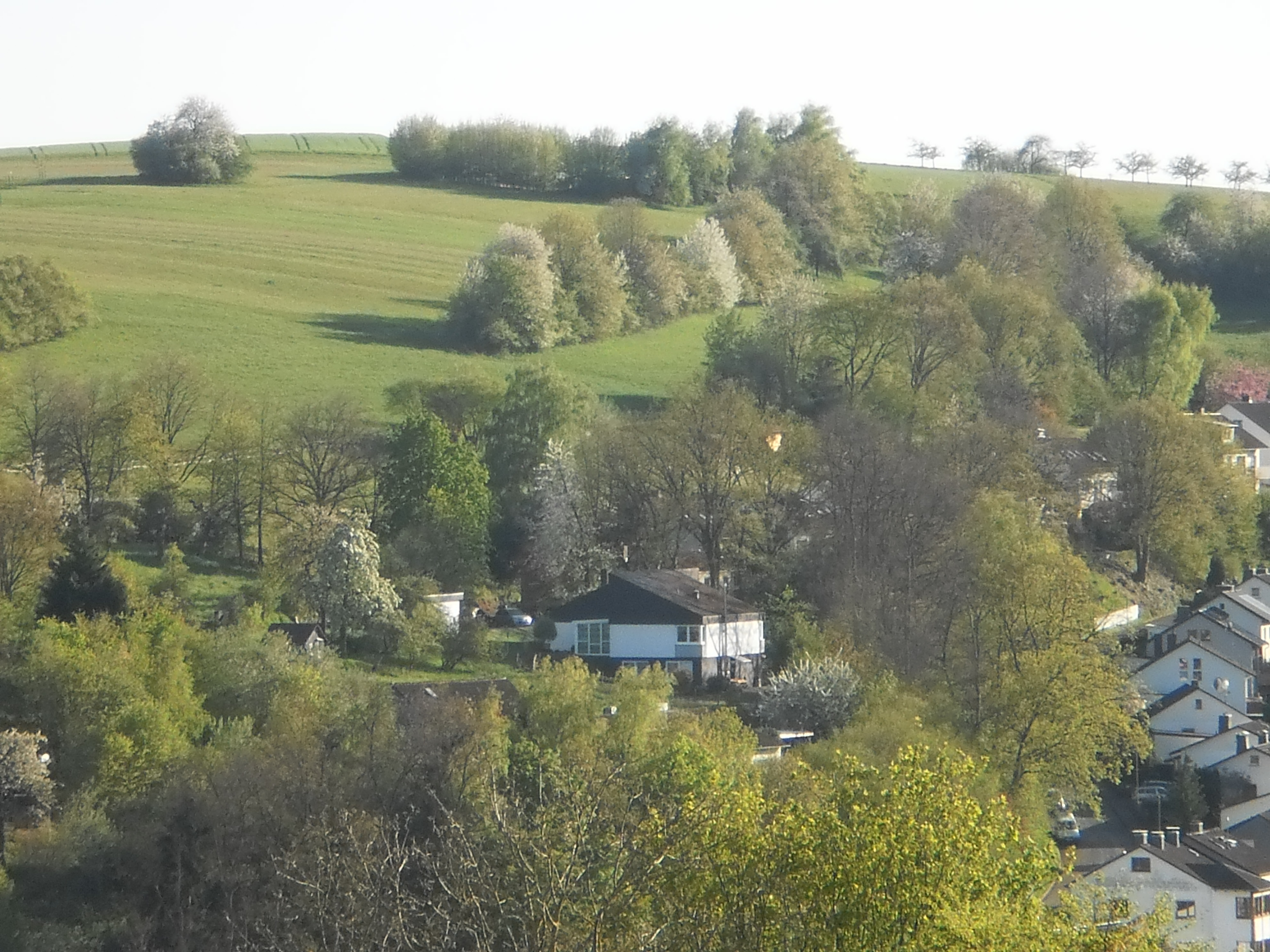 Hasenkopf-Hang und Oberes Ockershausen, Straße Gladenbacher Weg, Foto von der oberhalb des Seitentals der Lahn im Norden am Dammelsberg liegenden Hohen Leuchte im Frühjahr, Mai 2016 am Nachmittag.